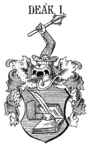 A kehidai Deák család cimere